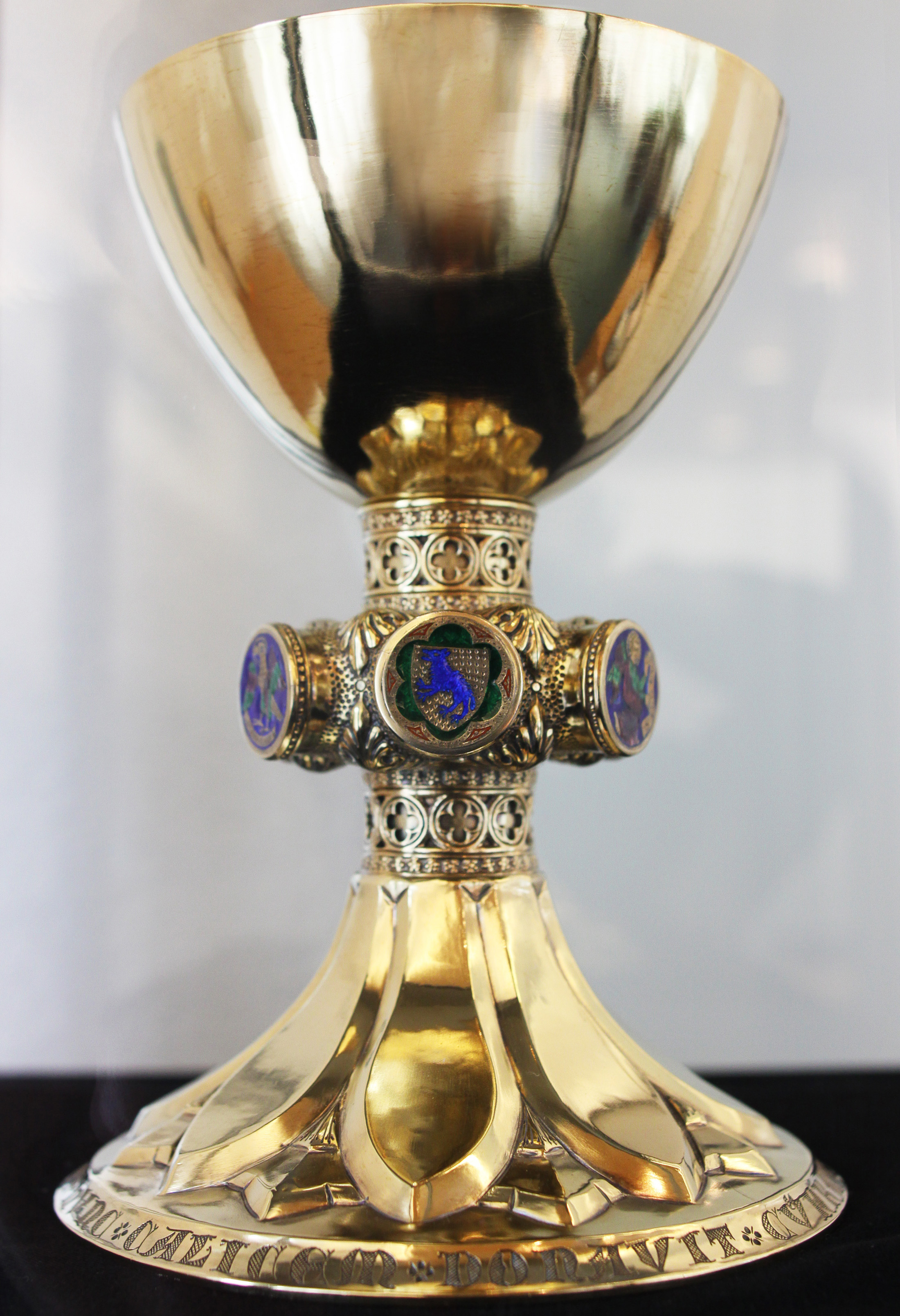 Die fotografierte Kopie des Wolfurter Kelches von 1364 ist Gemeindeamt Wolfurt augestellt. Das Original befindet sich im Schweizerischen Nationalmuseum.